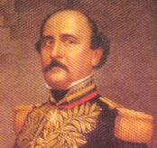 Juan Crisostomo Falcon